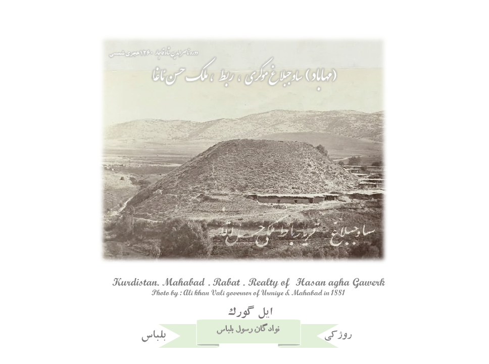 تاریخ ایل گورک